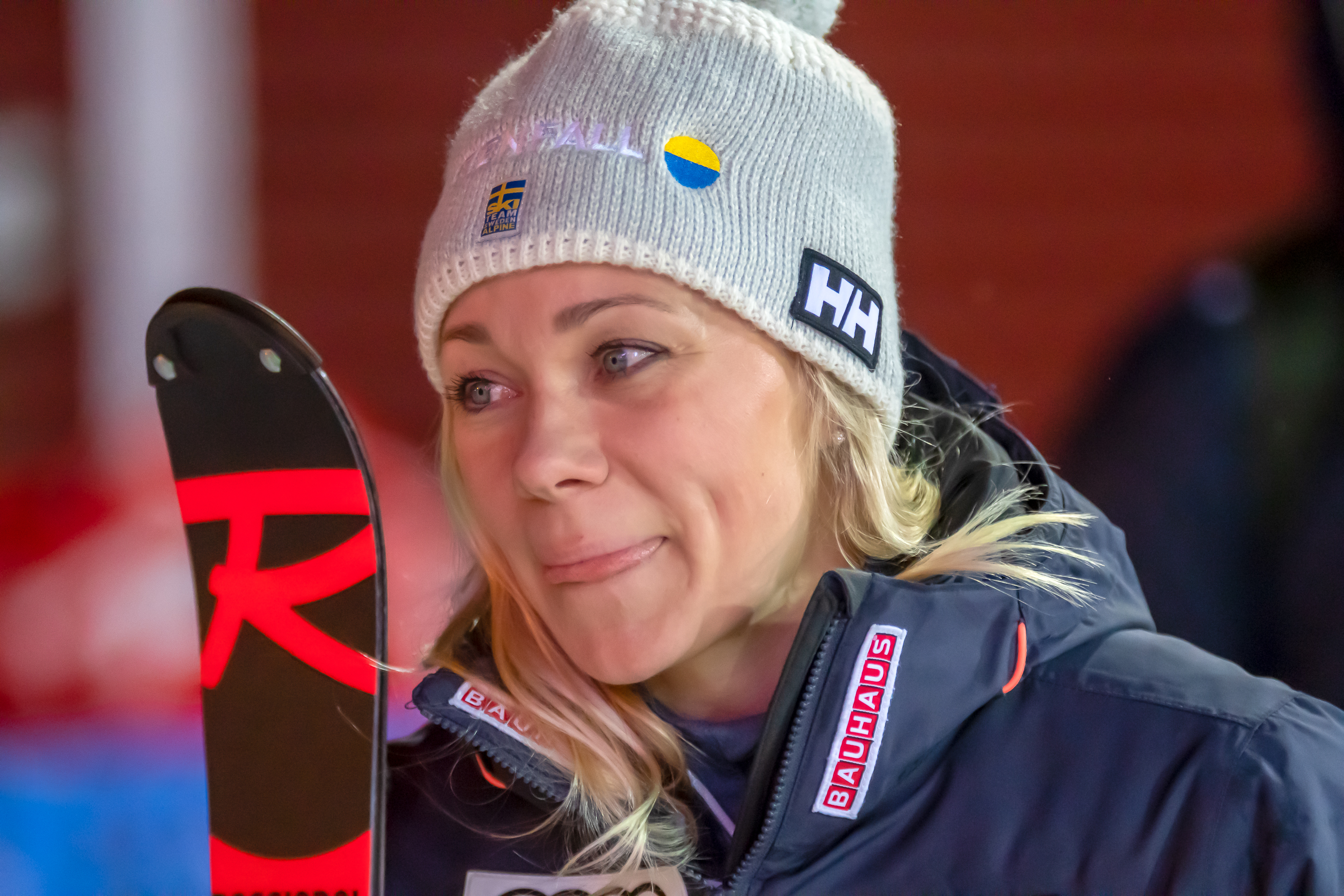 FIS Alpine Skiing World Cup in Stockholm 2019